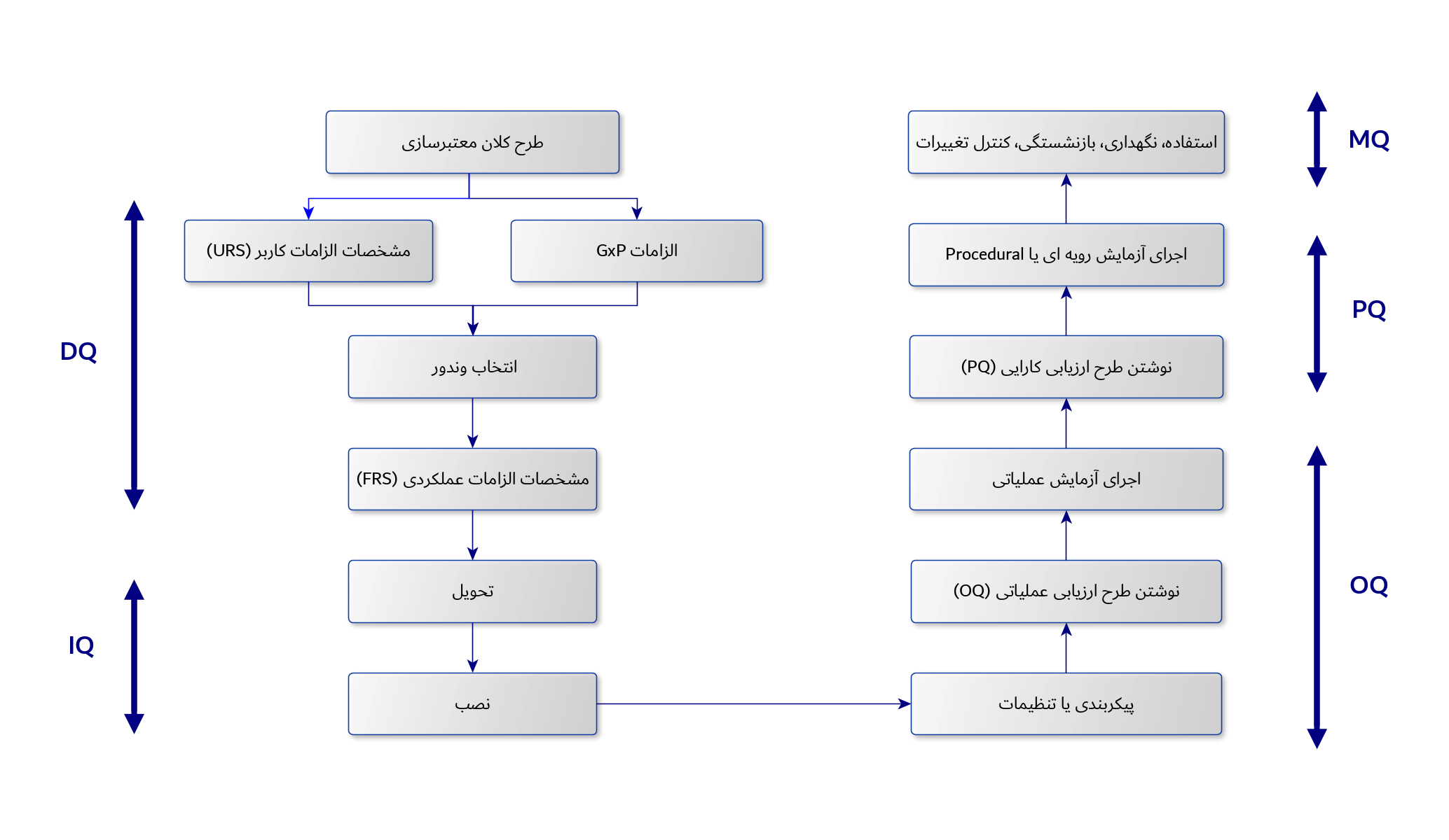 معتبرسازی